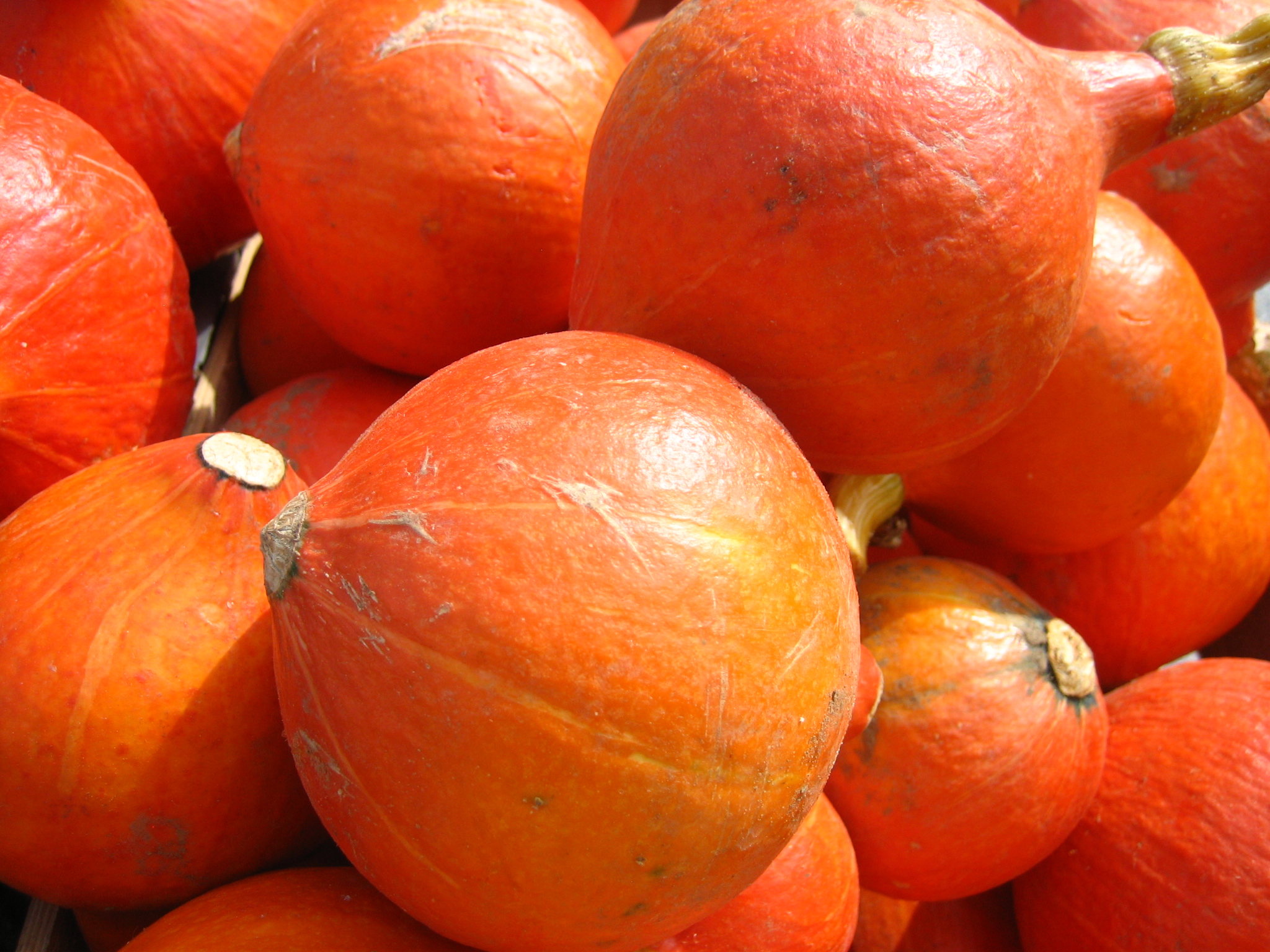 Squash